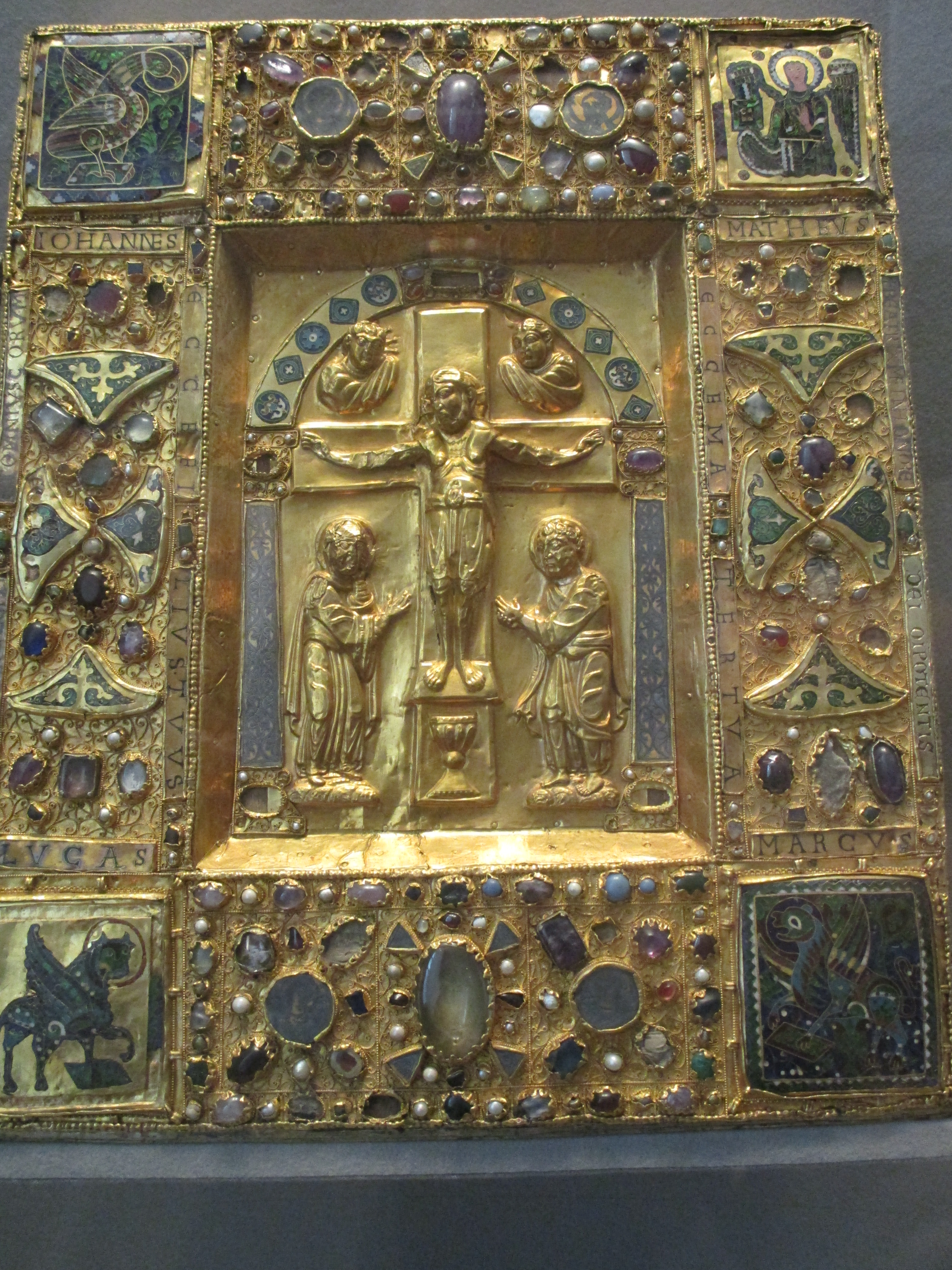 Musée du Louvre, salle Charlemagne du premier étage de l'aile Richelieu. Boîte de reliure présentant une Crucifixion avec les symboles des Évangélistes aux angles. Art ottonien (Trèves ou Ratisbonne) de la première moitié du XIe siècle. Or, émaux cloisonnés, nielle, cabochons. Provient de la basilique Notre-Dame de Maastricht. Acquis en 1795. N° d'inventaire MR 349.